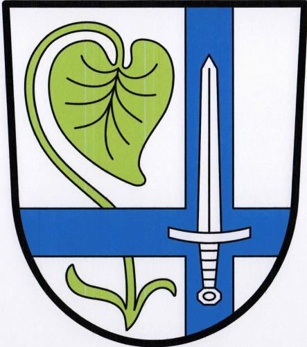 Znak obce Kostelec u Heřmanova Městce